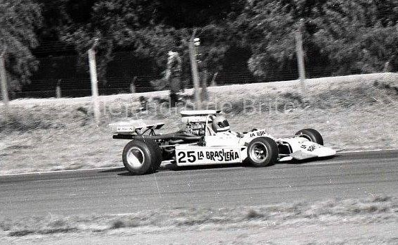 Jorge Omar Del Río (Berta-Tornado), F1MA 1973.